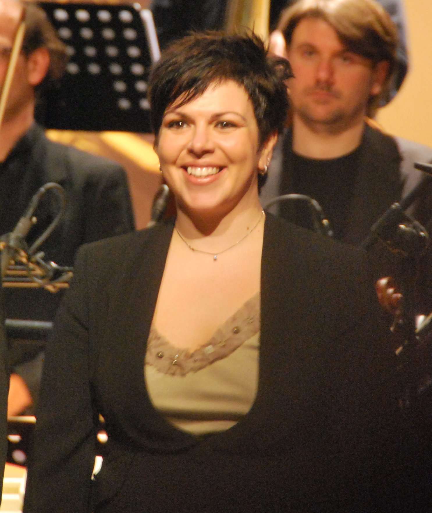 Sonia Prina podczas koncertu w Teatrze im. Słowackiego w Krakowie w ramach festiwalu Opera Rara, 18.12.2009